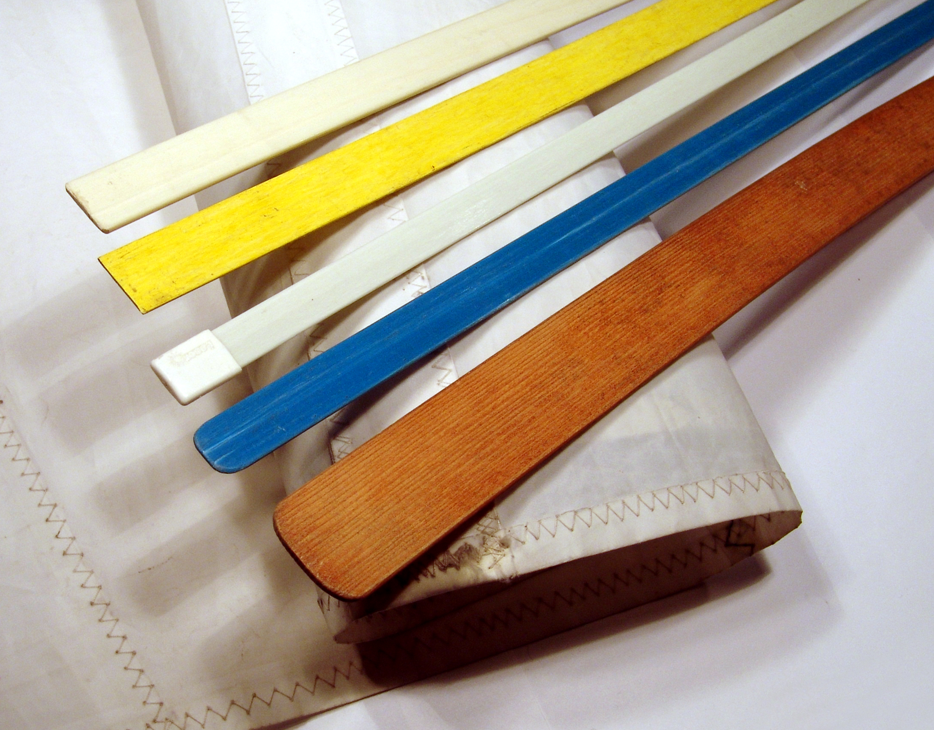 verschiedene Segellatten - hab sogar noch eine aus Holz gefunden (ganz vorne)